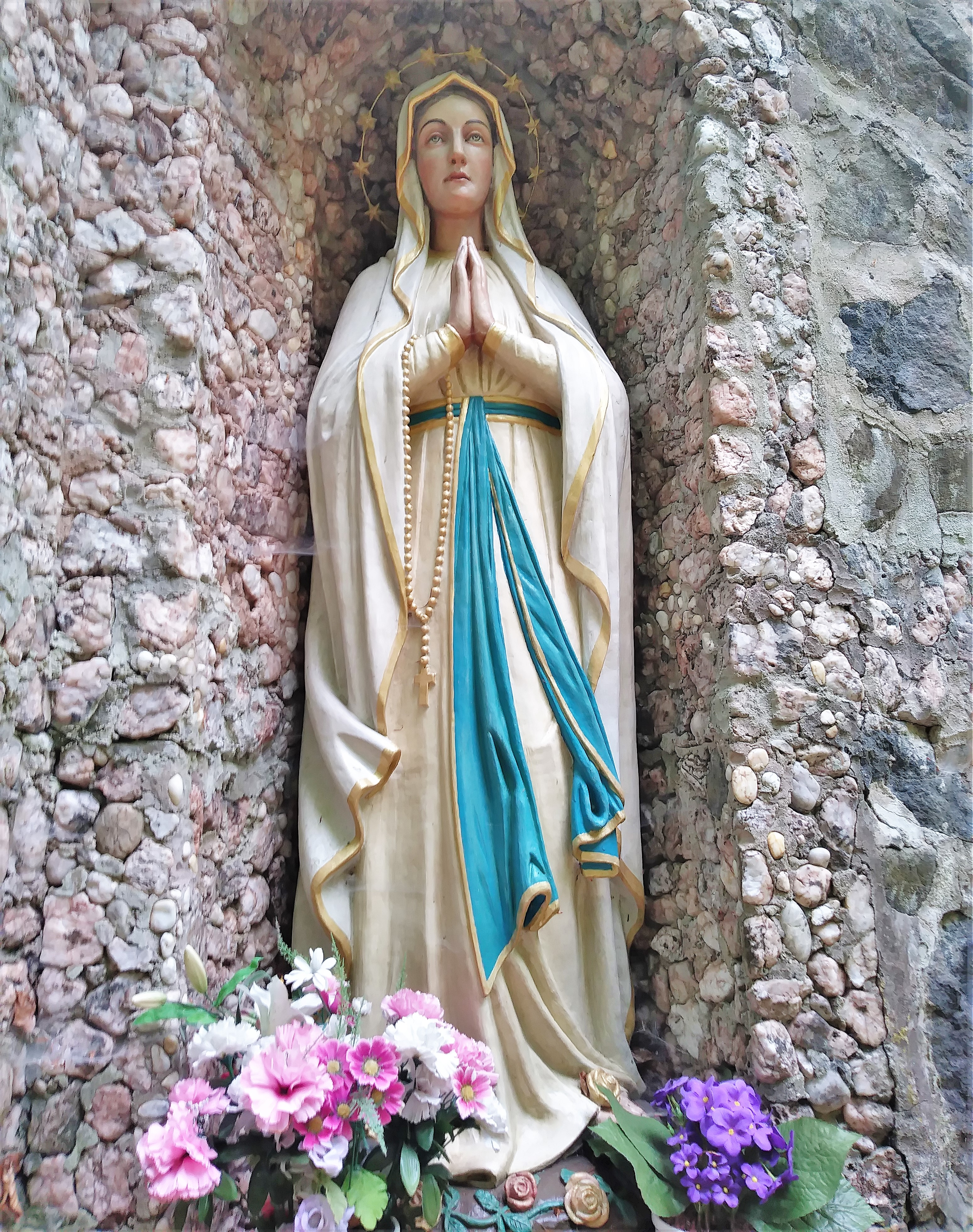 Mariengrotte Dautweiler (Marienfigur)